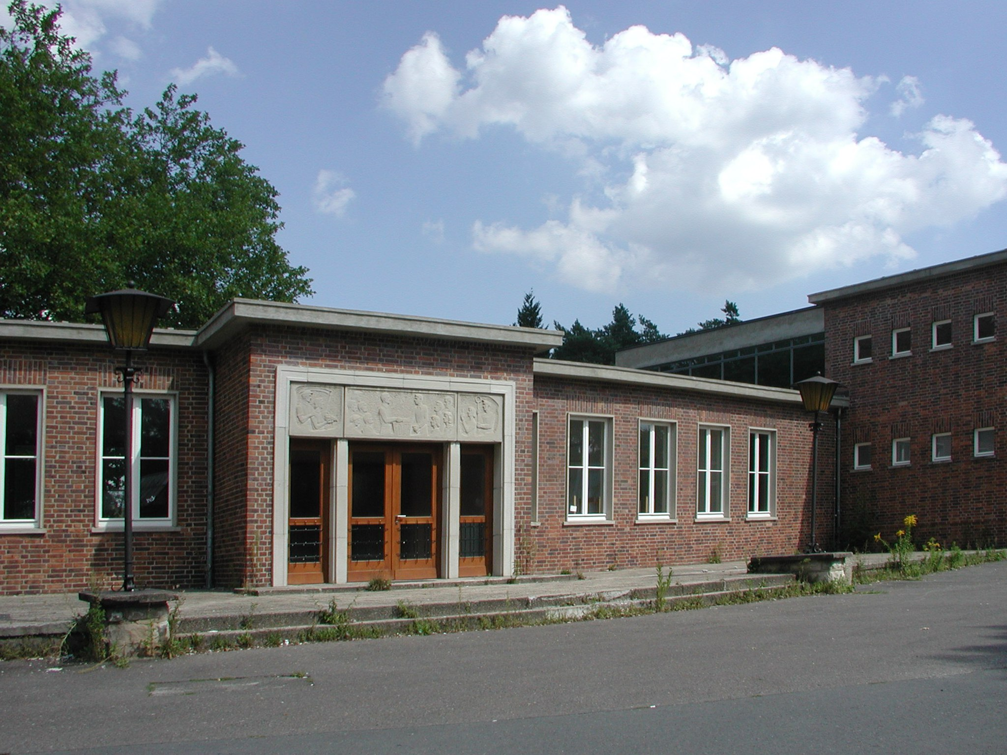 eh. Gewerkschaftsschule Bernau